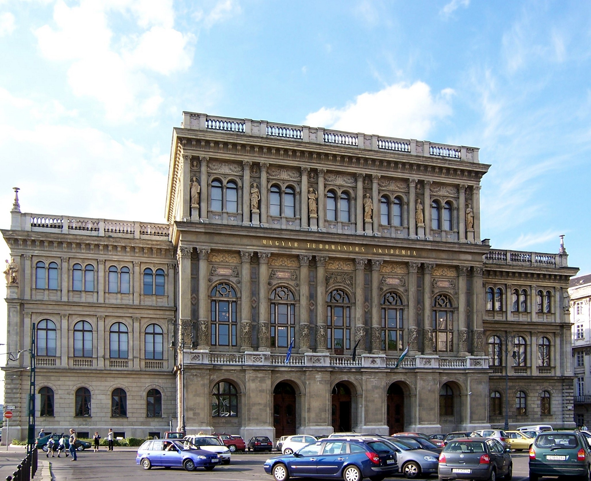 A Magyar Tudományos Akadémia épülete. Budapest. V. Széchenyi István tér 9. Átadás napja 1865. december 11.